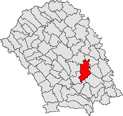 Categorie:Hărţi ale judeţului Botoşani